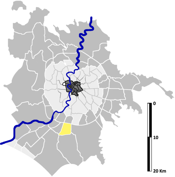 Vallerano